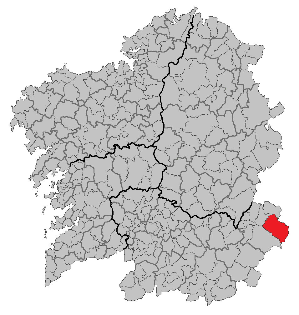 Mapa coa localización do concello de Carballeda de Valdeorras.